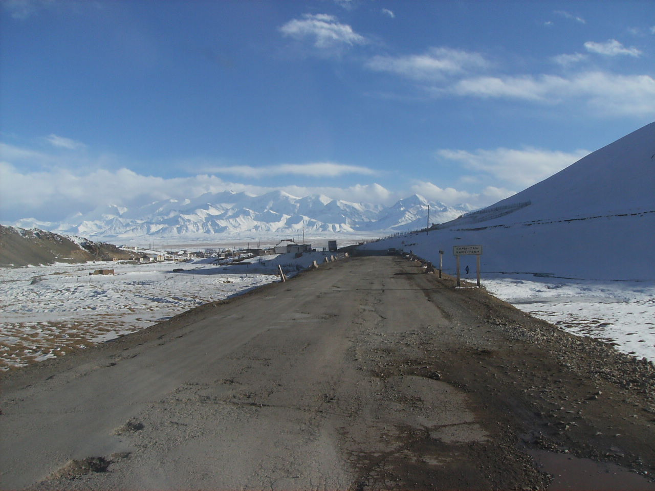 Sary Tash au Kirghizstan avec le massif du Pamir